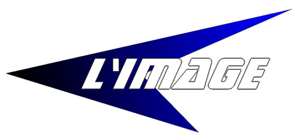 Das alte Band Logo von Loewenhertz